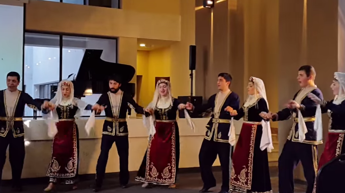 Կոմիտասի շորորը «Կարին» համույթի կատարմամբ